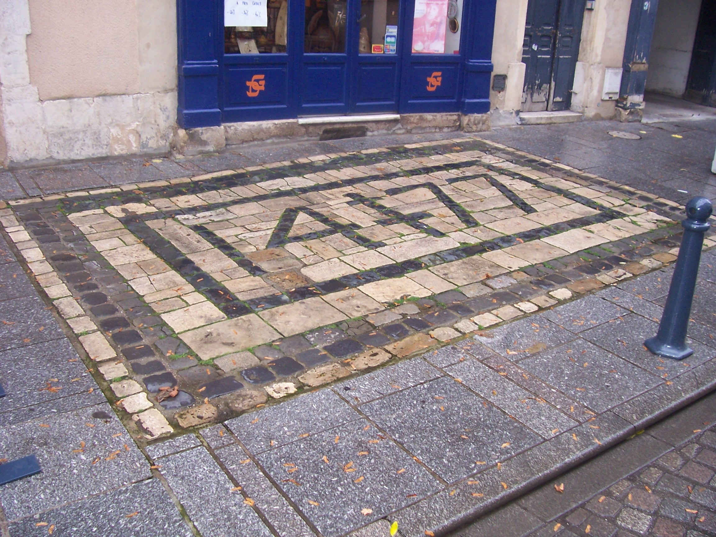 Année « 1477 » inscrite dans les pavés situés devant le bâtiment sis au numéro 30 de la Grande rue de Nancy, où le corps de Charles le Téméraire a été déposé le 5 janvier 1477 lors de la Bataille de Nancy.